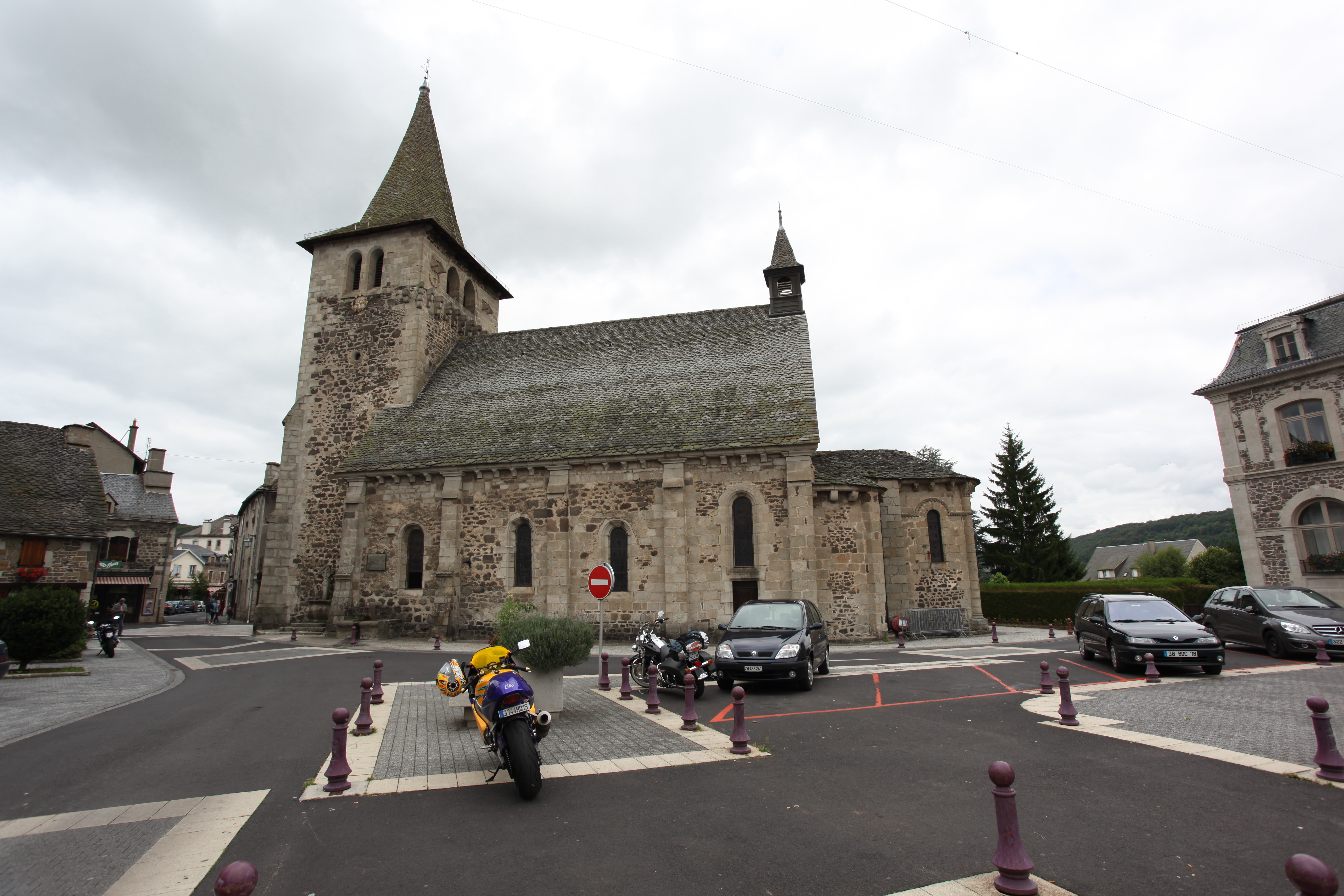 Église Saint-Georges à Riom-ès-Montagnes, Cantal, France